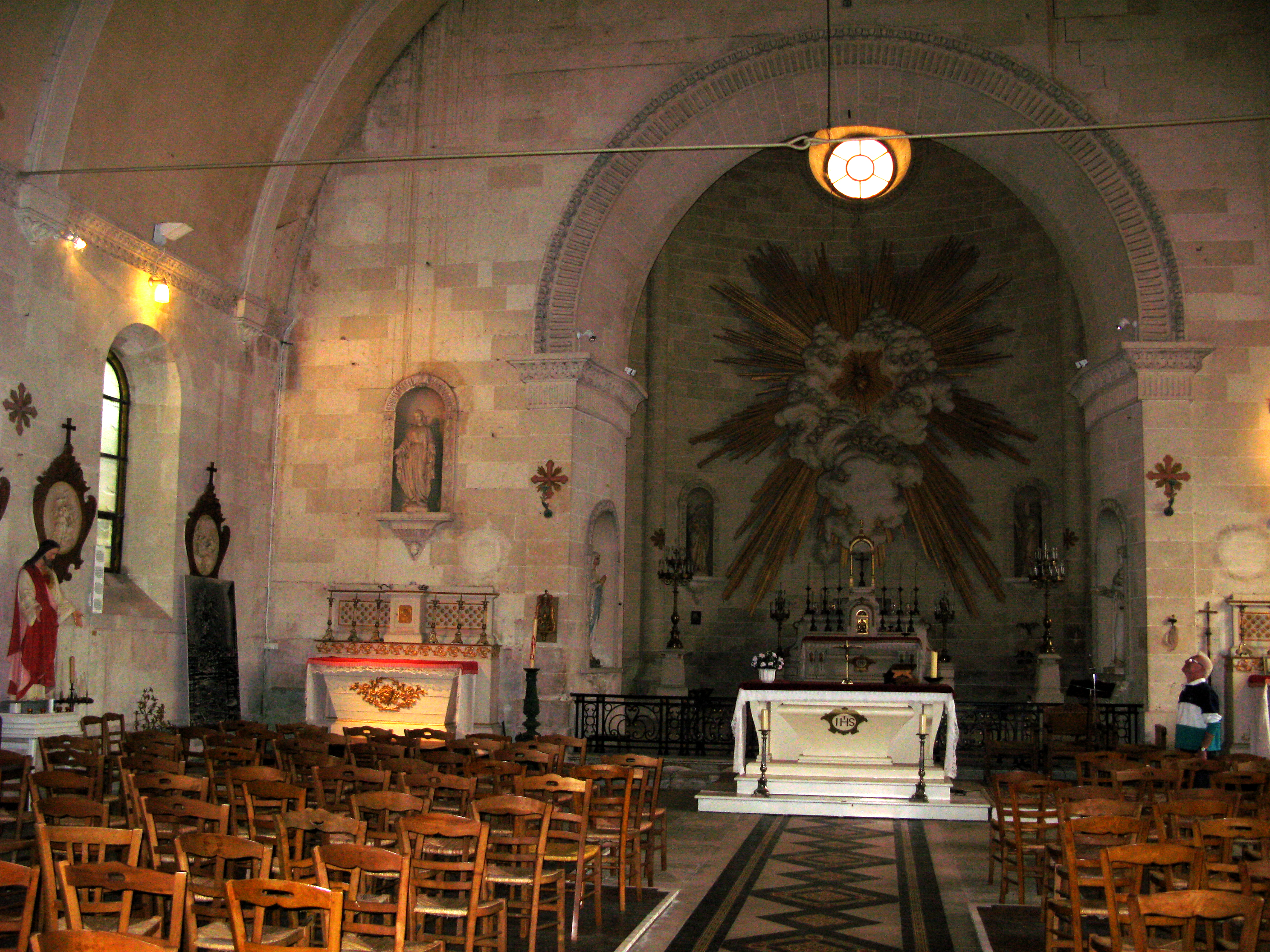 Grivesnes (Somme, France) - Intérieur de l'église. .